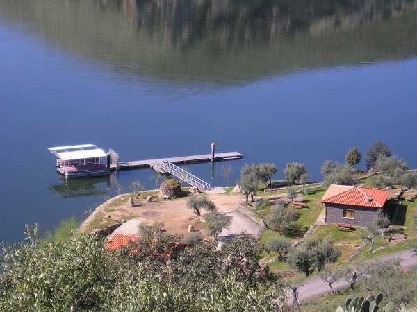 Fotografía de la zona de recreo de la Barca (Vilvestre)